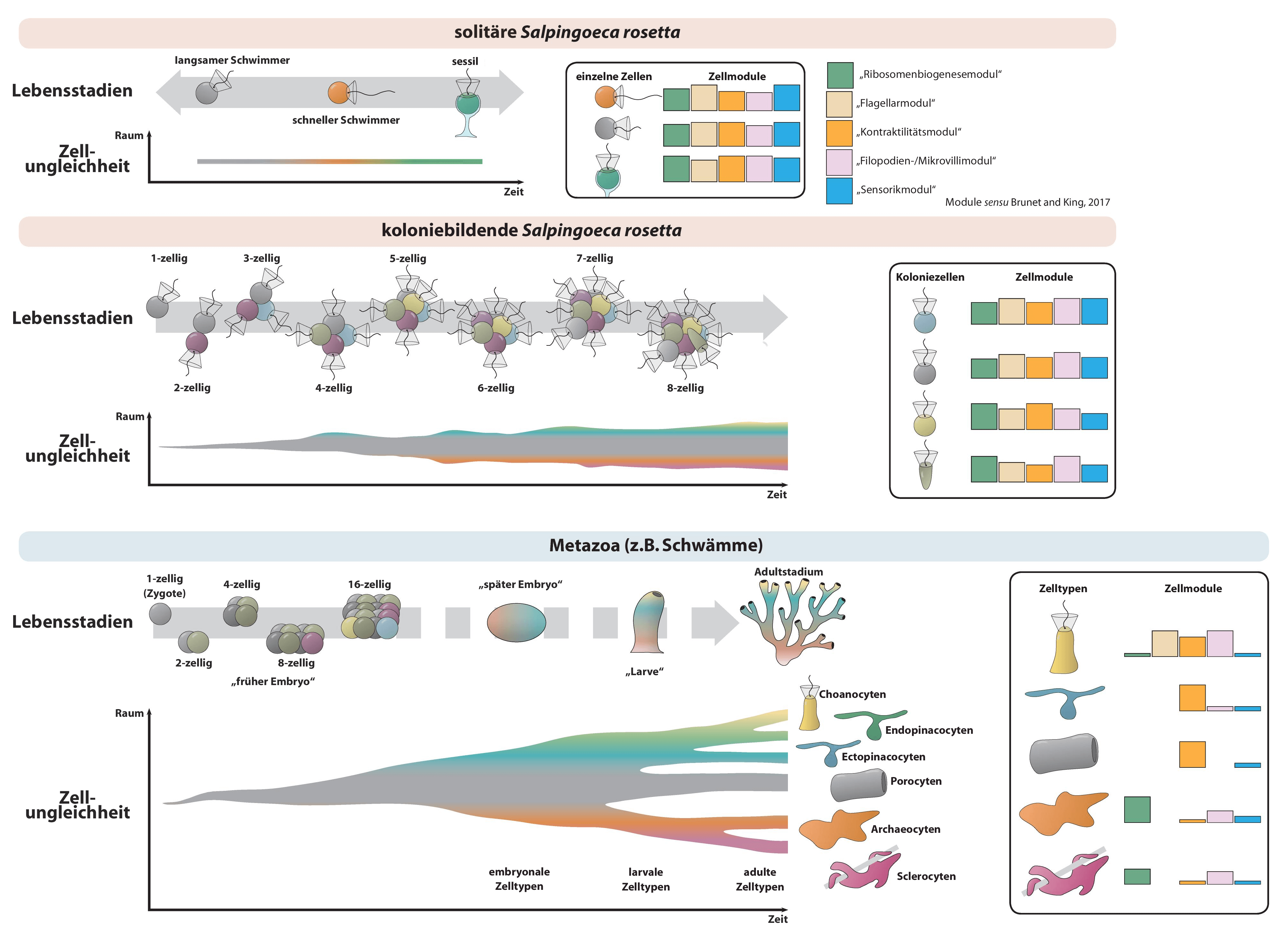 Hypothese zu räumlicher und zeitlicher Ausbildung von Zell-Ungleichheit bei einzelnen Zellen und Kolonien der Choanoflagellaten-Art Salpingoeca rosetta sowie bei Metazoen (z.B. Schwämmen). Drei Zelltypen werden bei solitären Stadien des Lebenszyklus von S. rosetta beschrieben (Dayel et al., 2011). Jeder der solitären Zelltypen kann verschieden stark ausgeprägte Zellmodule (sensu Brunet and King, 2017) aufweisen und die verschiedenen Zelltypen existieren ausschließlich zeitlich voneinander getrennt. Bei koloniebildenden S. rosetta treten verschiedene Zelltypen auch räumlich getrennt auf. Mit zunehmender Größe der Kolonie nimmt die Wahrscheinlichkeit zu, dass diese verschiedene Zelltypen aufweist. Bei Metazoen wächst die Anzahl der Zellen in deutlich höherem Maße, was zu einer hochgradigen Zell-Ungleichheit führt. Während der Individualentwicklung differenzieren sich die Zellen in verschiedene Zelltypen, die jeweils eine spezifische Garnitur von Zellmodulen aufweisen. Durch diesen Prozess wird die Ungleichheit zwischen Zellen des gleichen Typs verringert, die Ungleichheit zwischen Zellen verschiedener Zelltypen jedoch verstärkt.